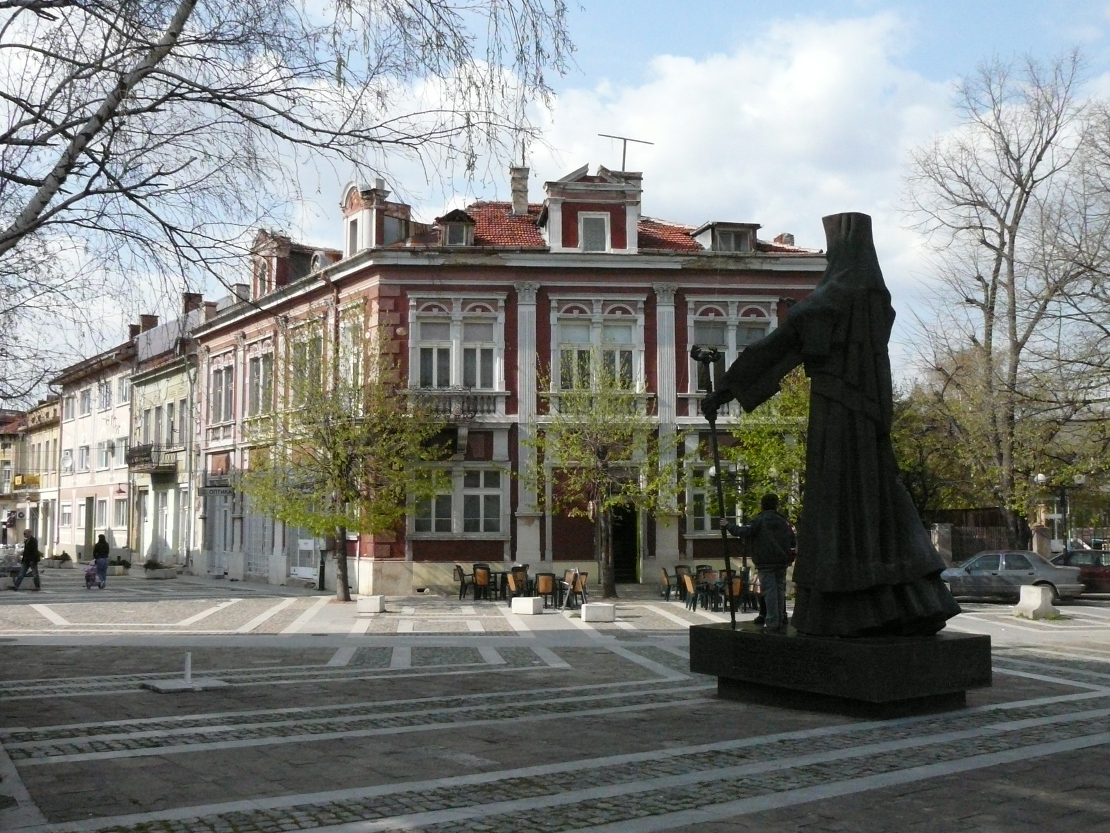 Vratsa,Bulgaria